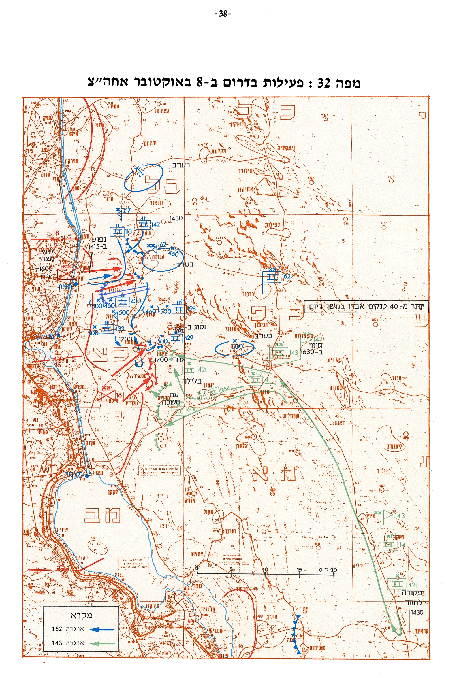 אטלס מלחמת יום הכיפורים. מפה 32 - פעילות בדרום ב-8 באוקטובר אחרי הצהרים - מלחמת יום הכיפורים